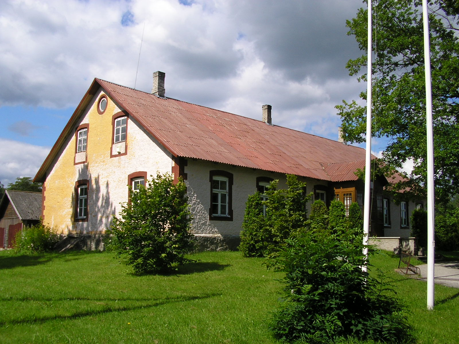 Albu vallamaja Järva-Madisel